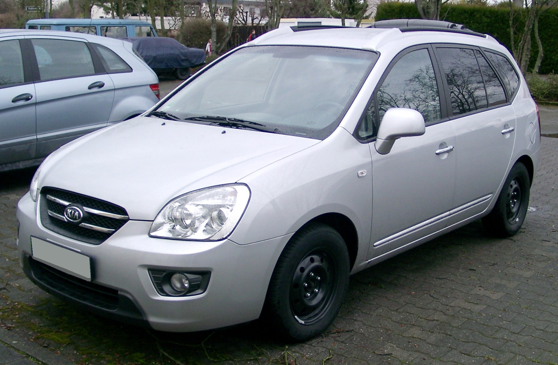 Kia Carens